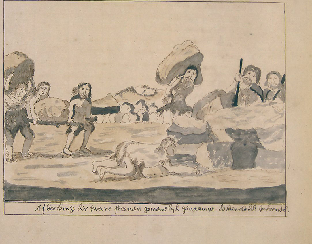 Beschrijving van het Landschap Drente, met Afbeeldingen der voornaamste Huizen